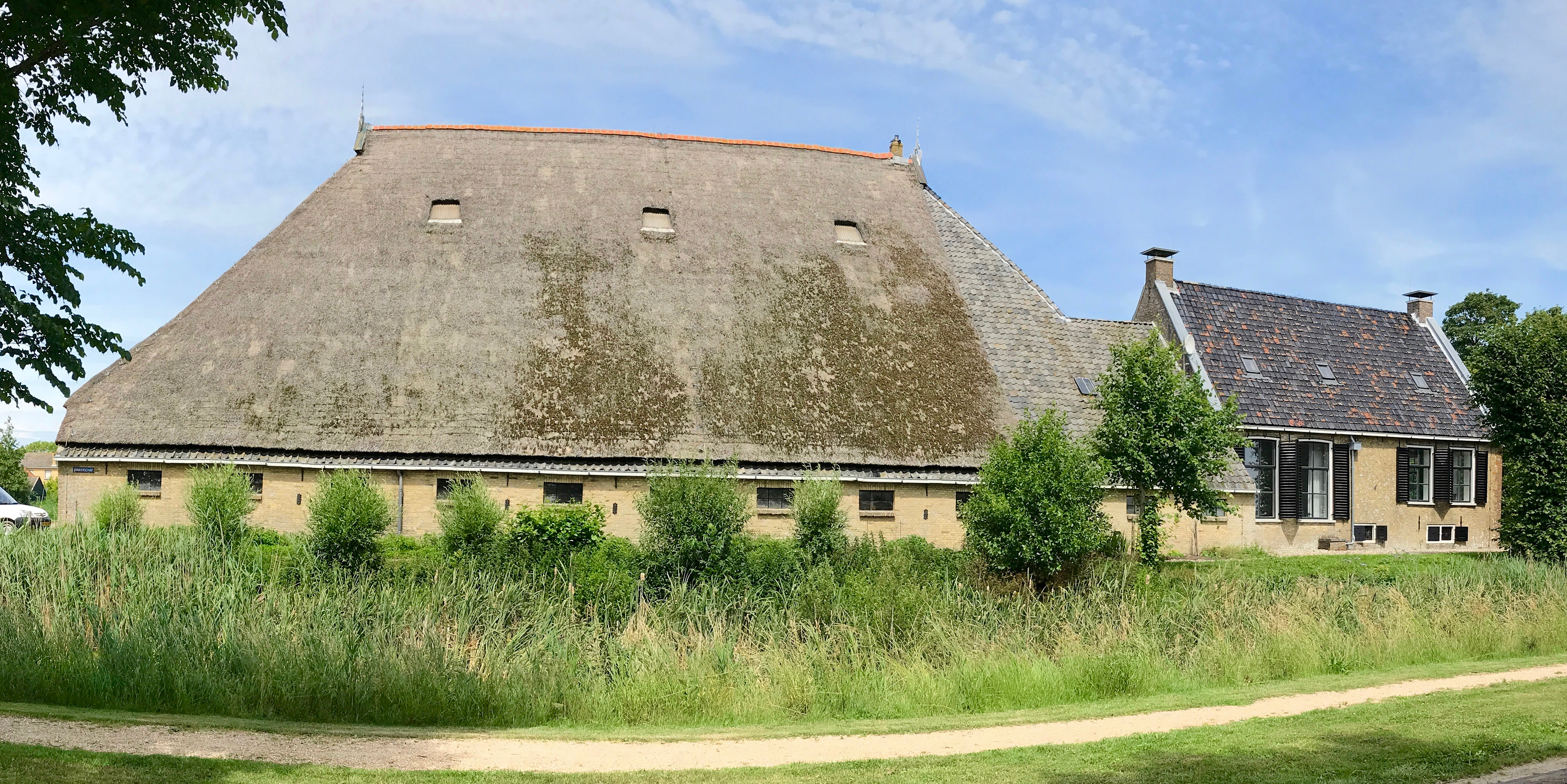 Jonkerschap 1